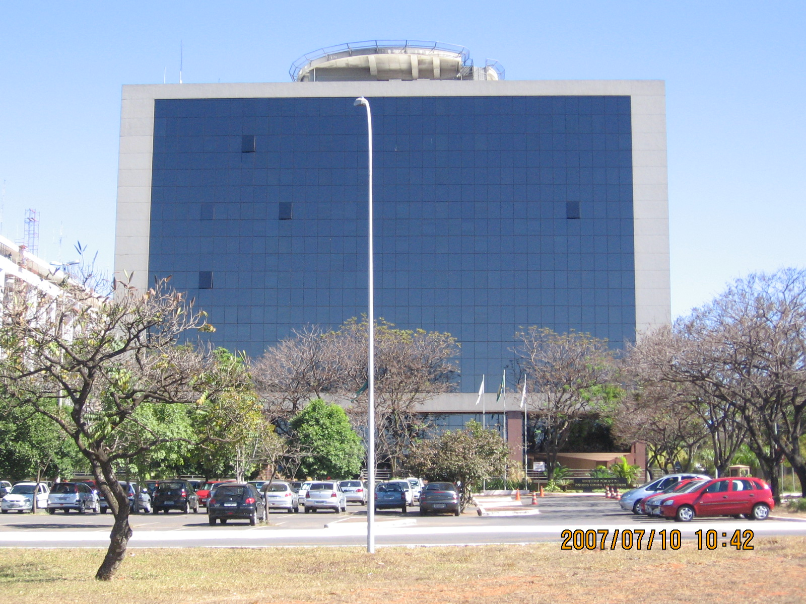 Ministério Público do Distrito Federal e Territórios, visto a partir do Leste